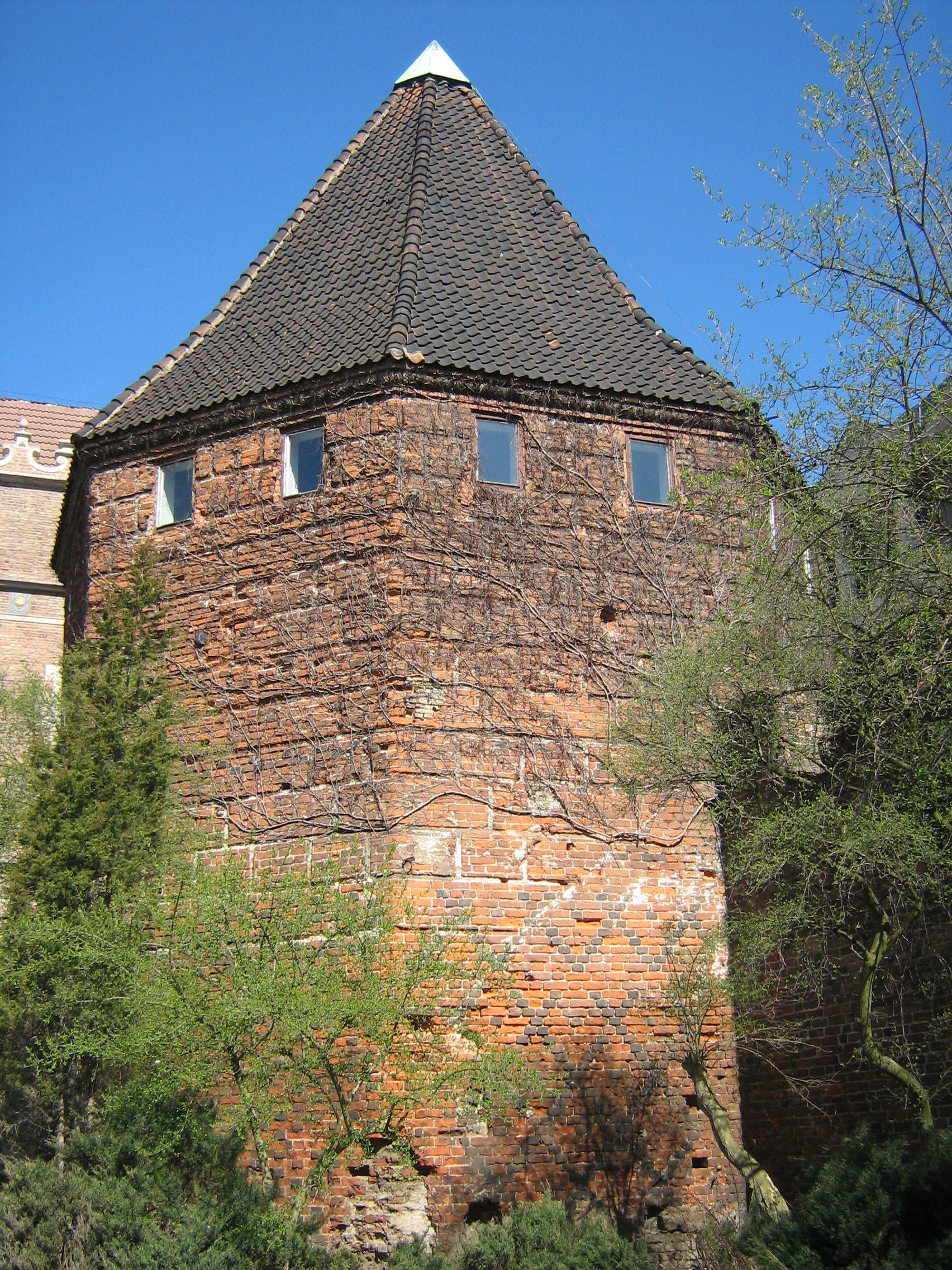 Gdańsk Główne Miasto, Targ Węglowy - Baszta Słomiana, XIV, XV, XVI w zespole średniowiecznych murów obronnych Głównego Miasta - z basztami